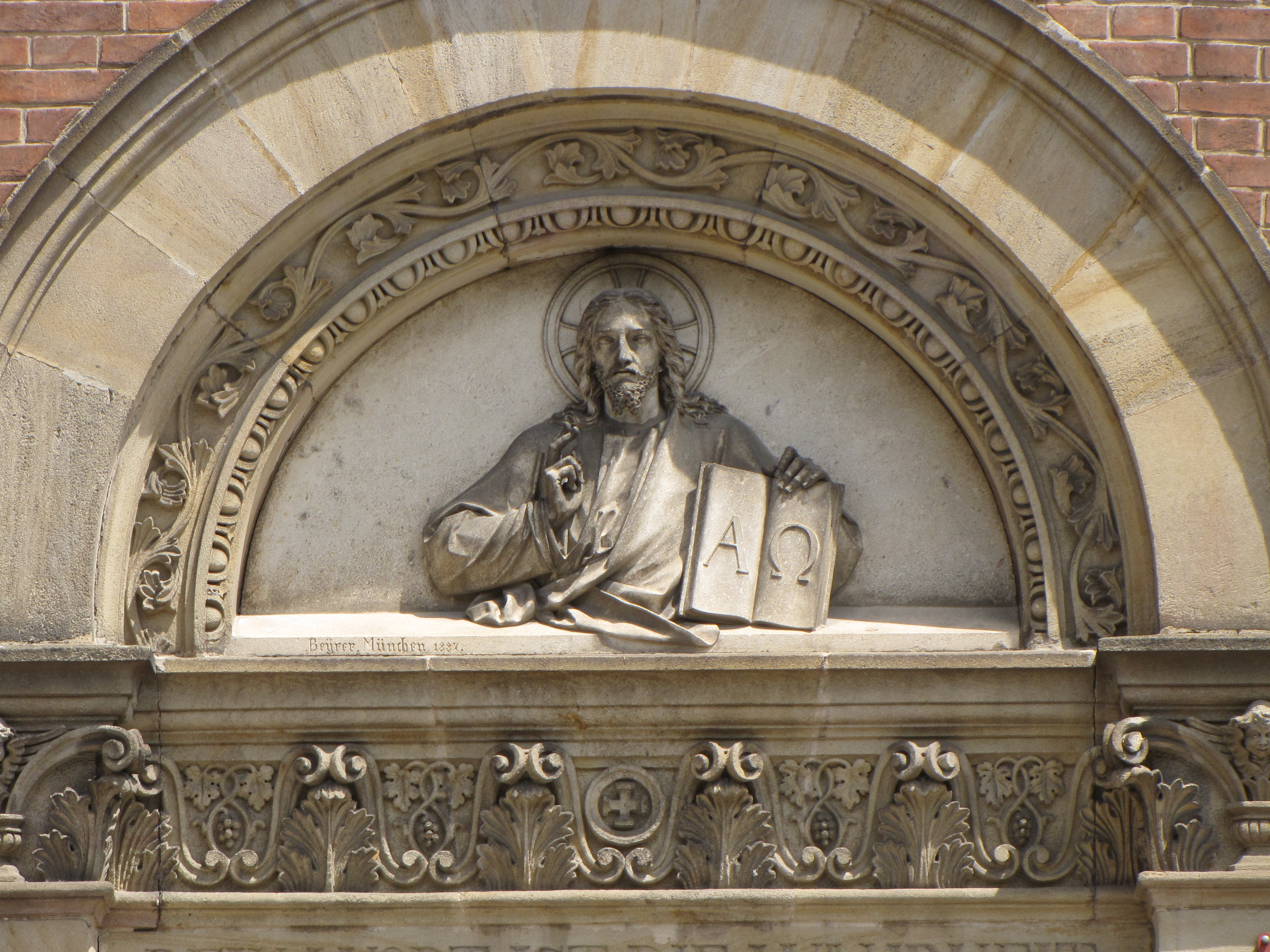 Steinrelief (Christus) von Josef Beyrer, 1887, über dem Eingang der Erlöserkirche in Eichstätt